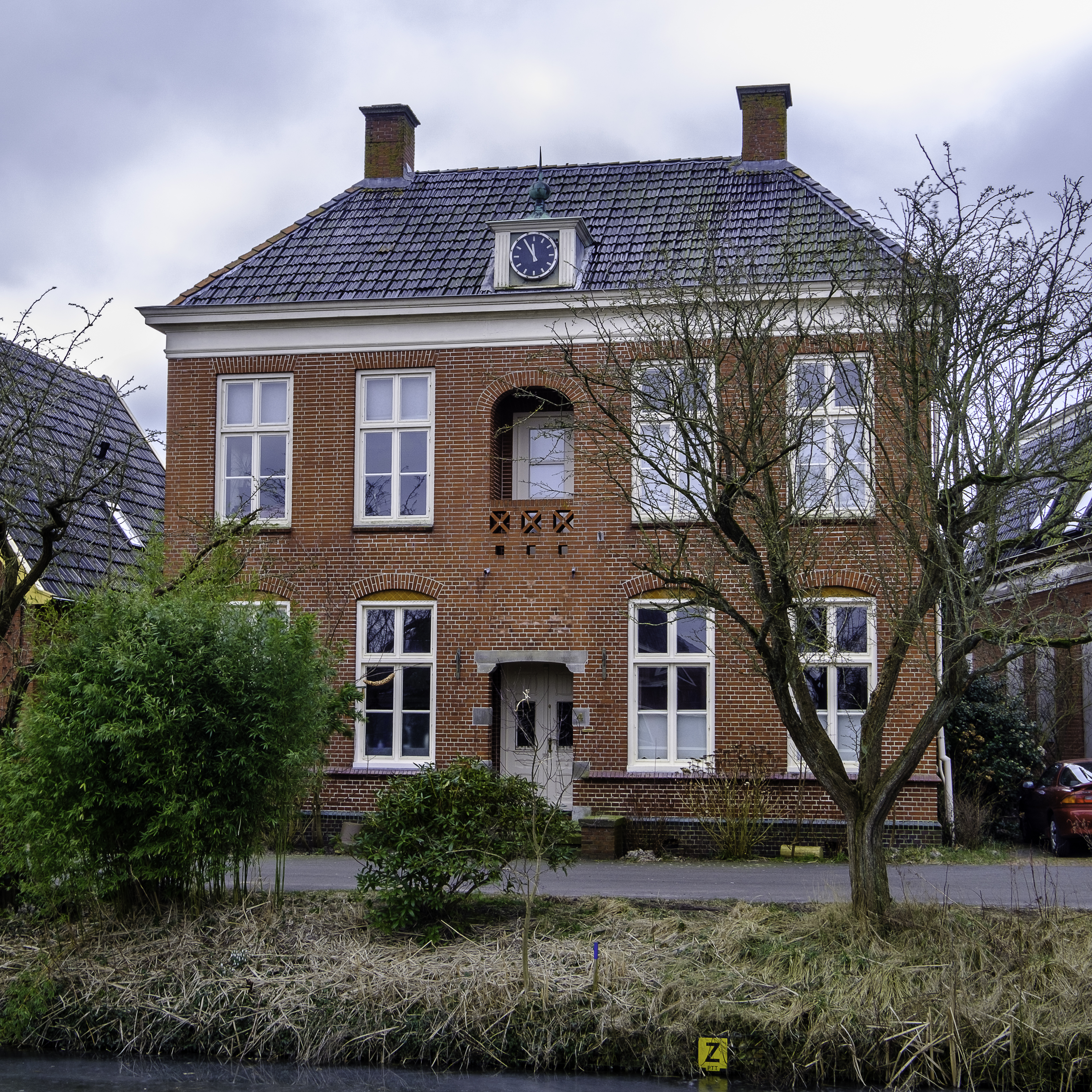 Voormalig Gemeentehuis Noorddijk